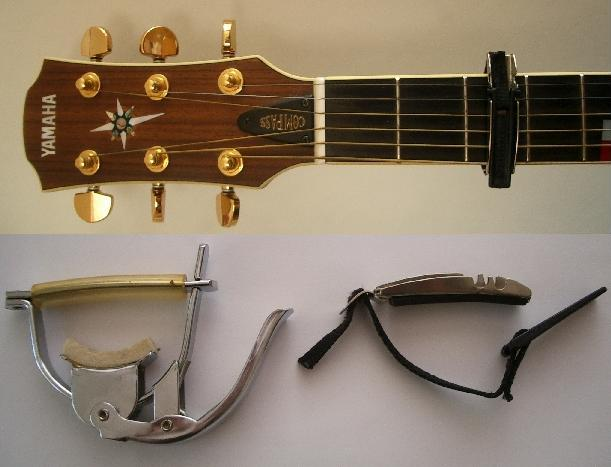 Zwei Gitarrenkapodaster in unterschiedlicher Bauform.